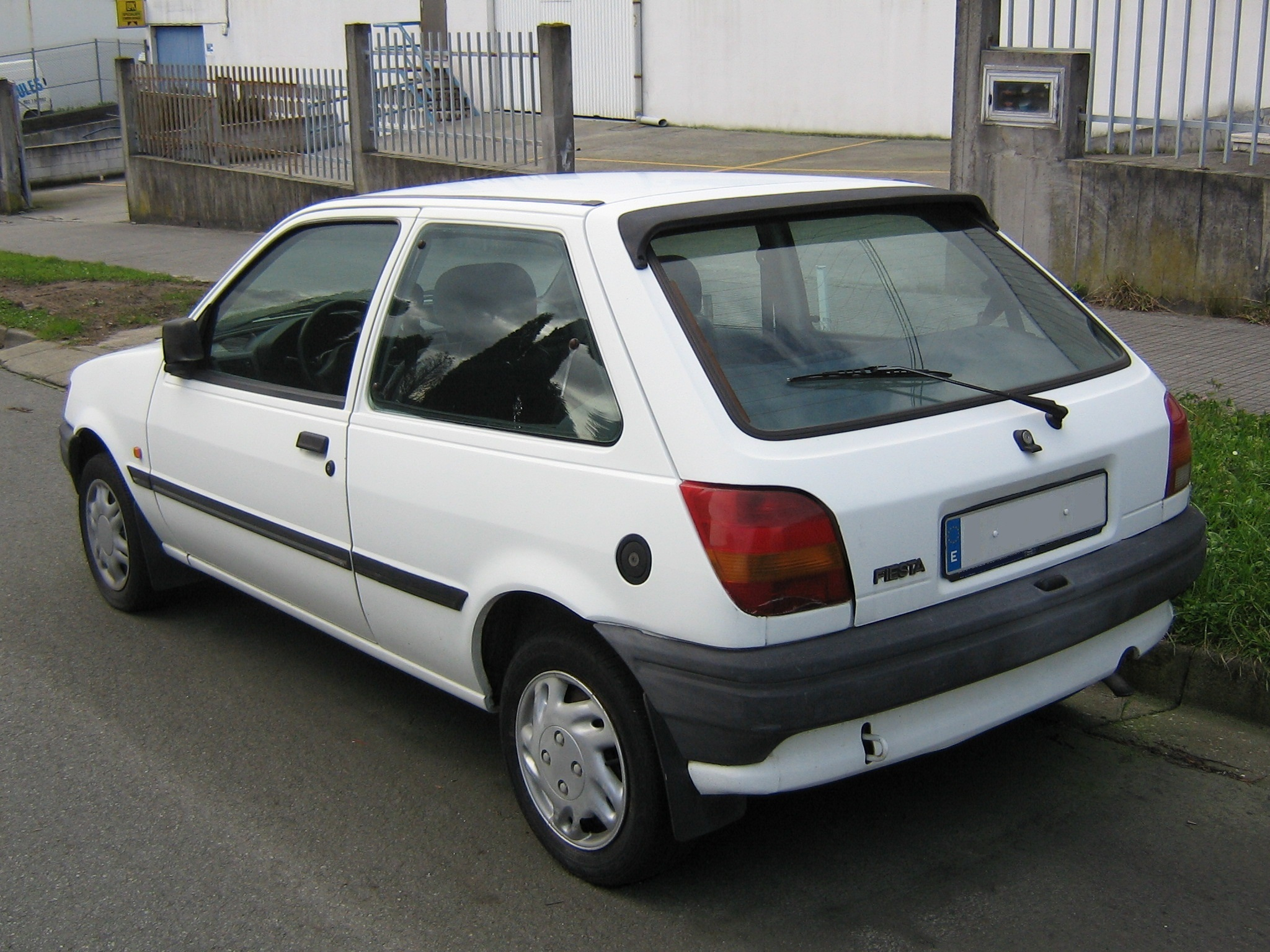 Un Ford Fiesta de color blanco.